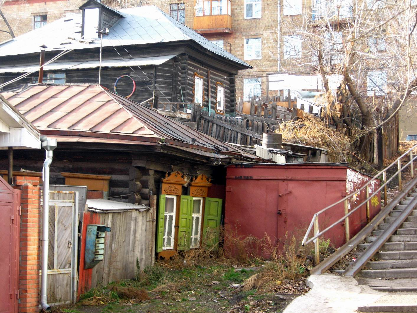 Ул.Л.Прушинской.